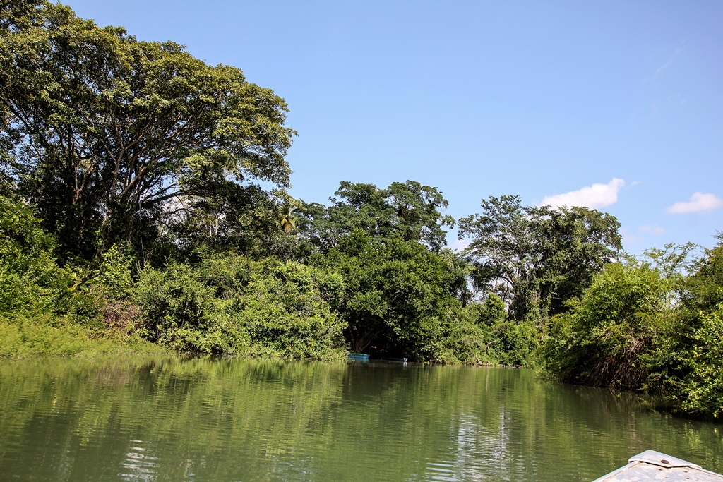 Río Petexbatún